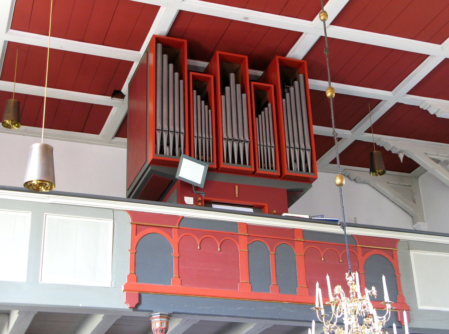 Orgel in Potshausen, Landkreis Leer